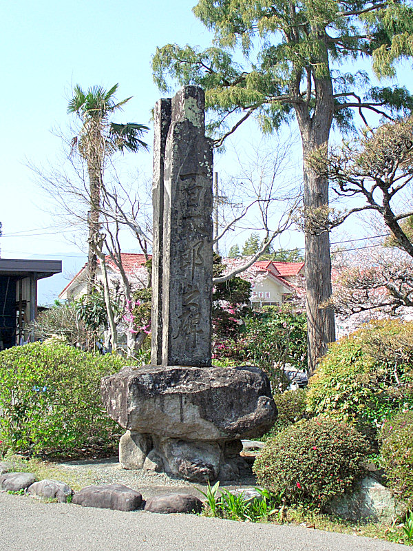 慈願寺にある百太郎之碑 撮影者/著者/著作権保有者 : MK Products (本人がアップロード) 撮影日 : 2007/03/30 東多良木駅用にアップロードした画像です。良い画像があれば別の画像に変えてください。